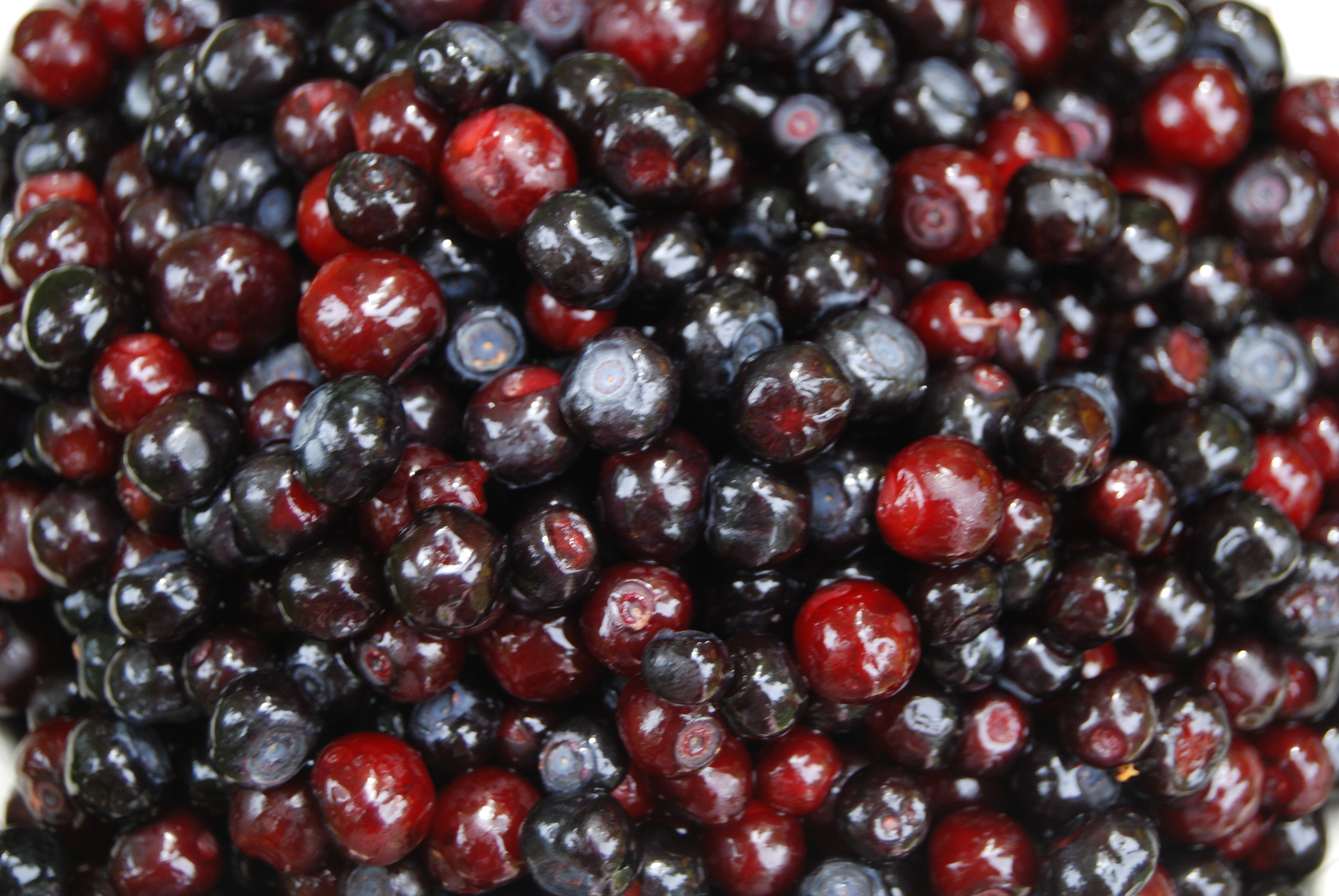 huckleberries